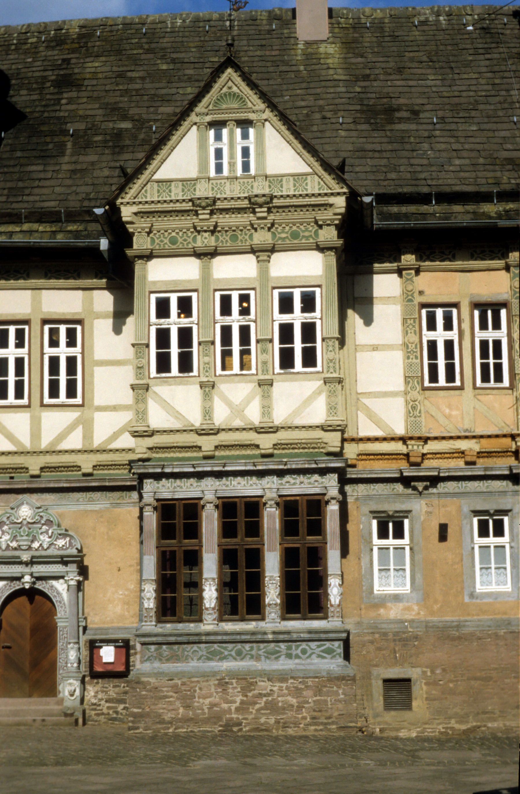 Weserrenaissance-Schloss Bevern, Utlucht zum Innenhof